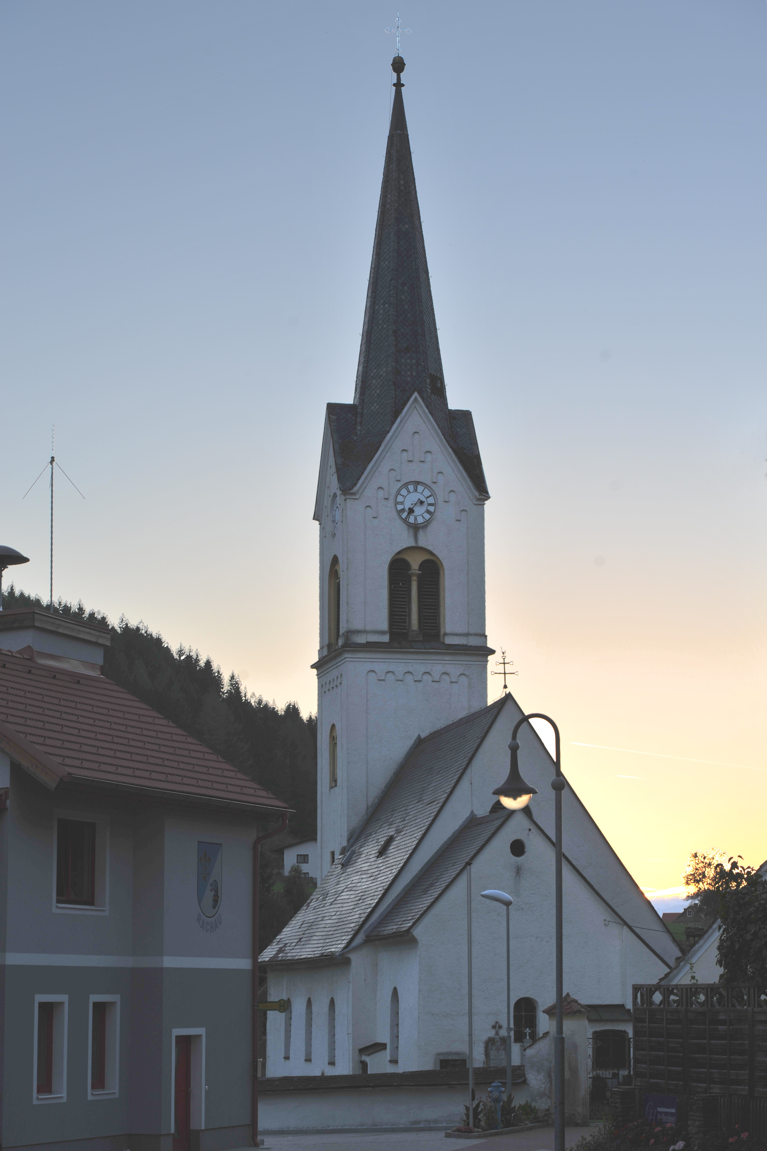 Kath. Pfarrkirche hl. Oswald Dieses Foto wurde im Rahmen des von Wikimedia Österreich unterstützten Projekts Wiki takes oberes Murtal erstellt. The making of this work was supported by Wikimedia Austria. For other files made with the support of Wikimedia Austria, please see the category Supported by Wikimedia Österreich.